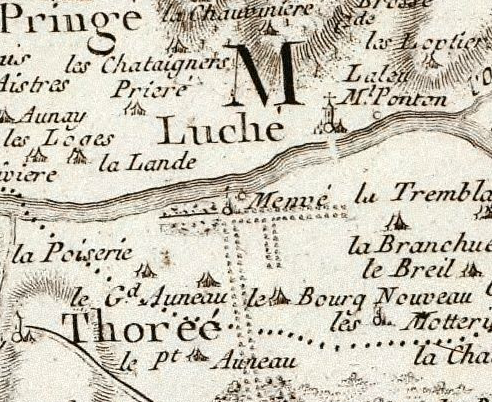 Localisation du château de Mervé sur la carte de l'évêché du Mans d'Hubert Jaillot en 1706.